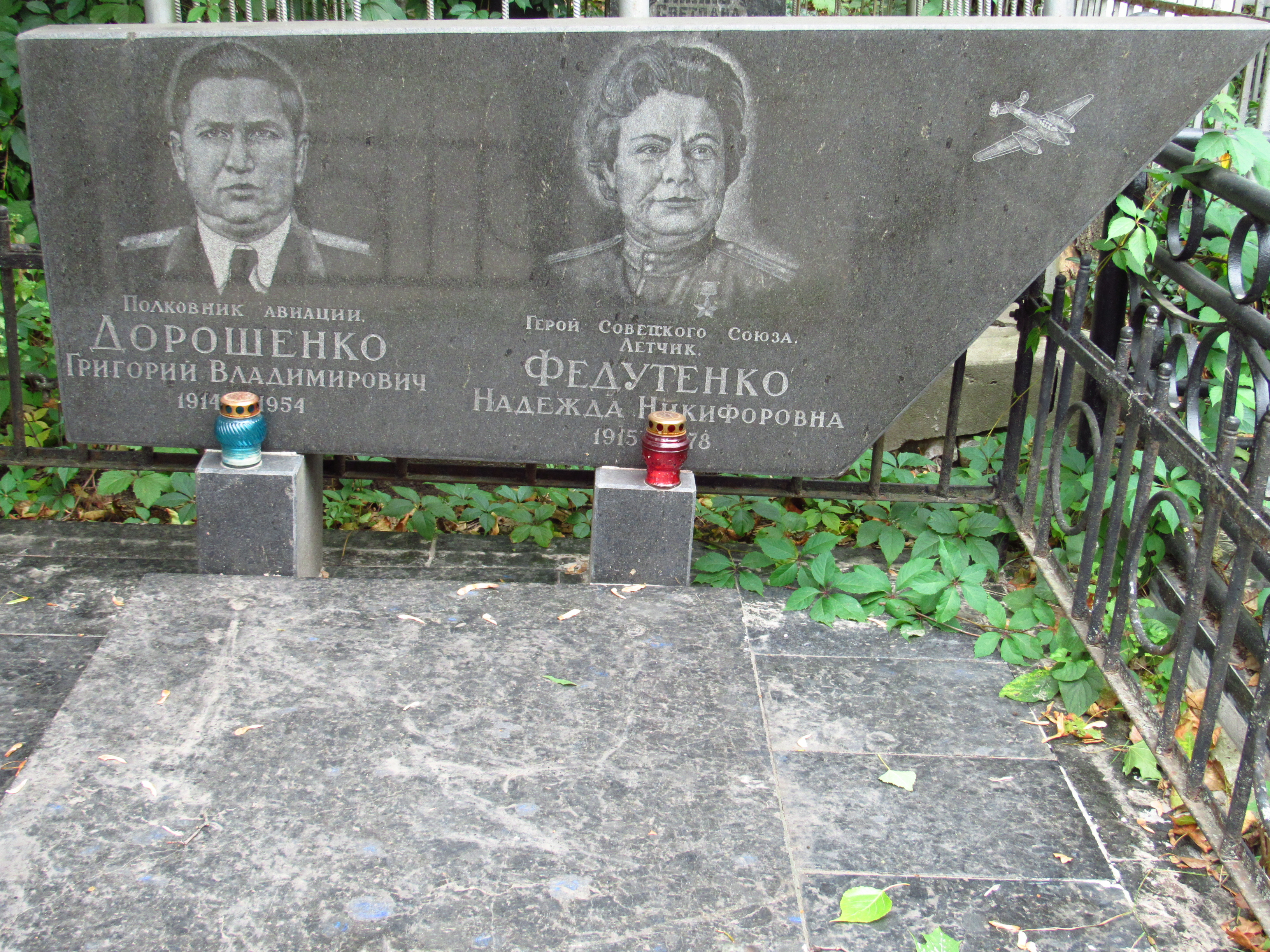 Могила Федутенко Н. Н., Героя Радянського Союзу, Київ, Байкова вул., 6, діл. 43